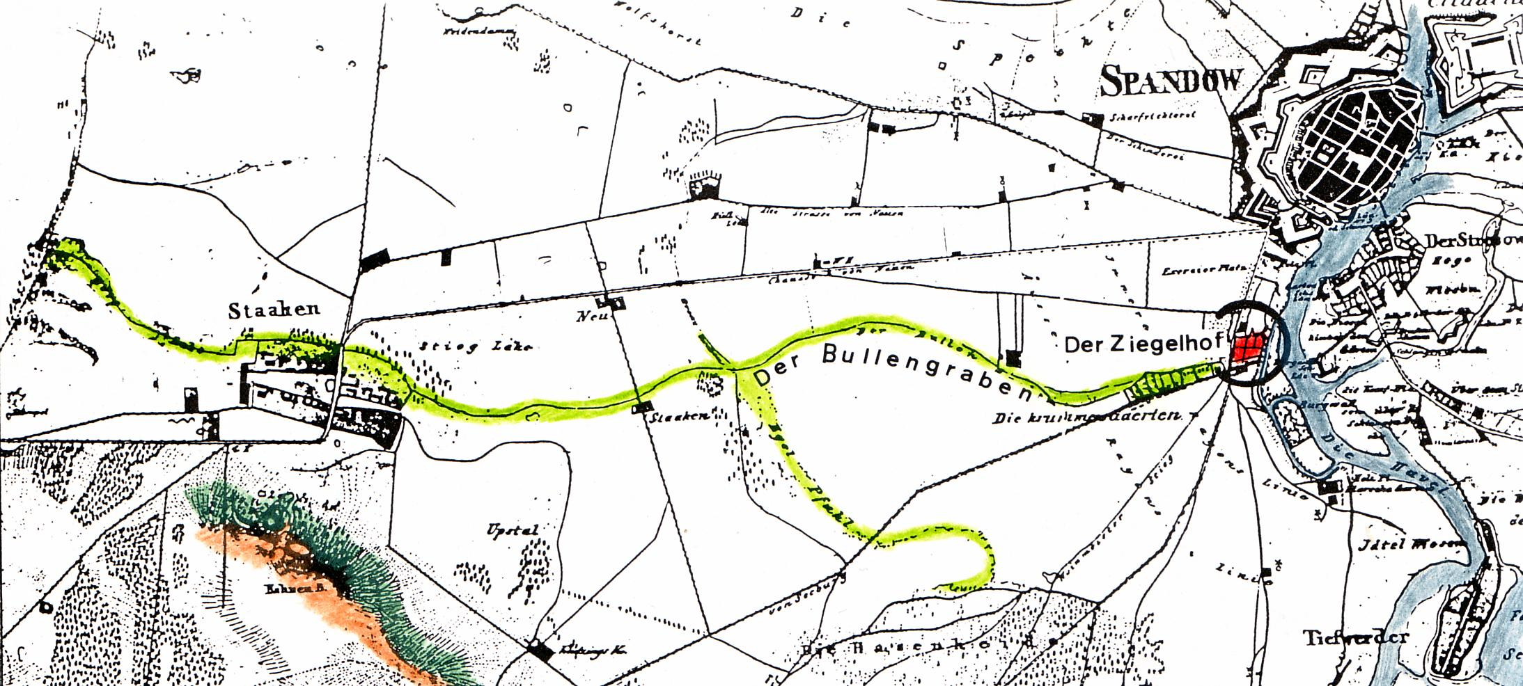 Bullengraben, Egelpfuhlgraben, Ziegelhof und Burgwallinsel 1836. Today part of Berlin-Spandau, Germany.